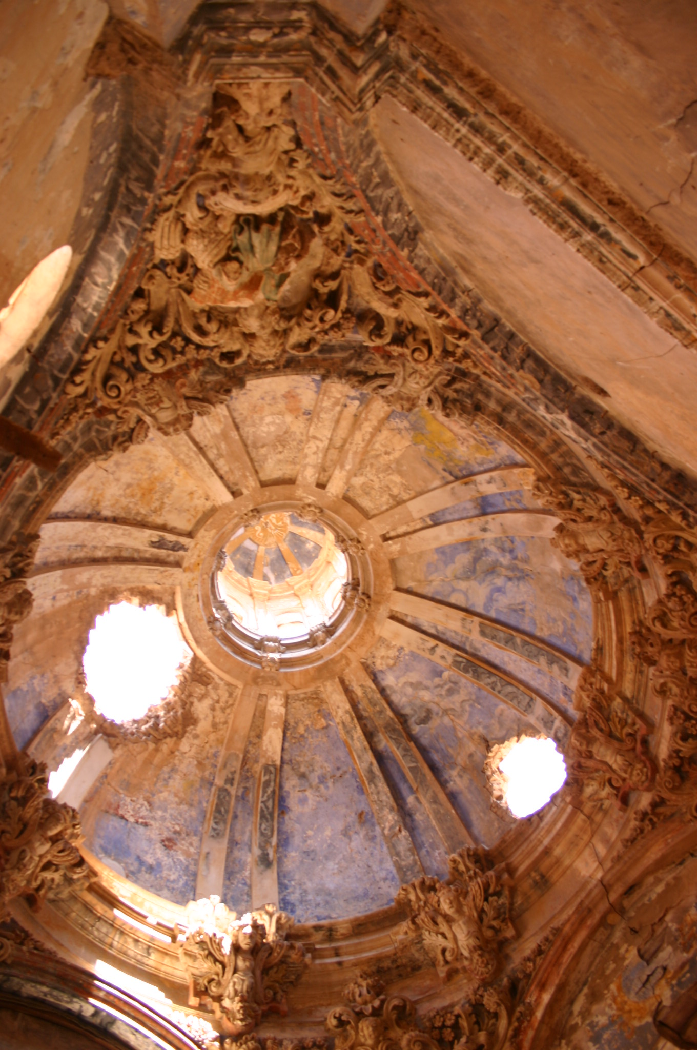 Detalles pueblo viejo de Belchite